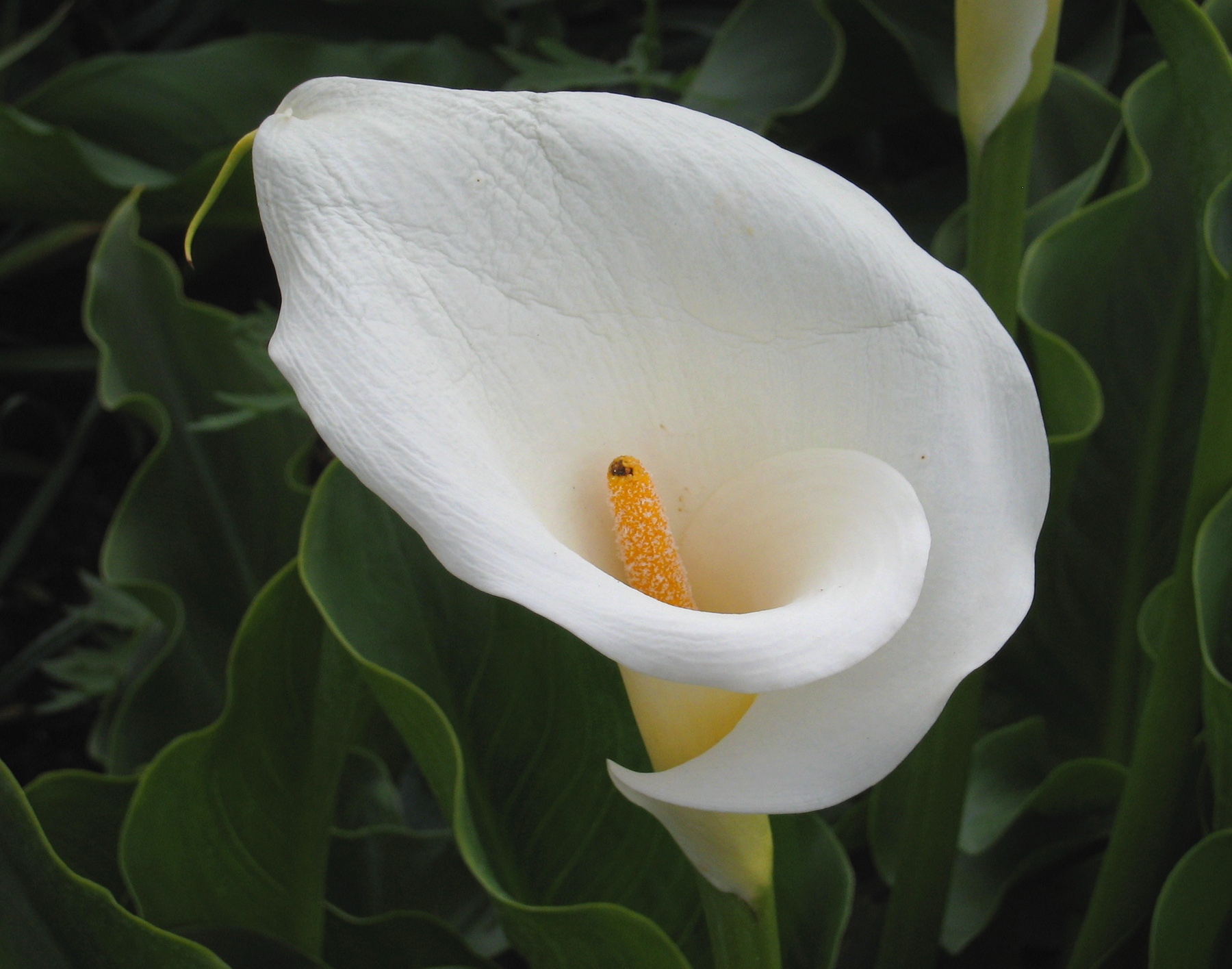 Château de Cheverny, Loir-et-Cher, France - gardens, Zantedeschia